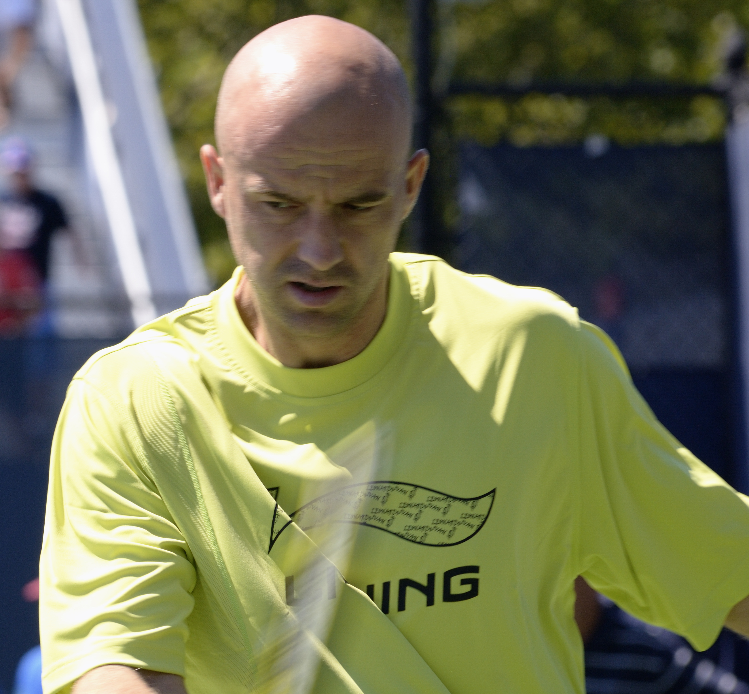 lubby